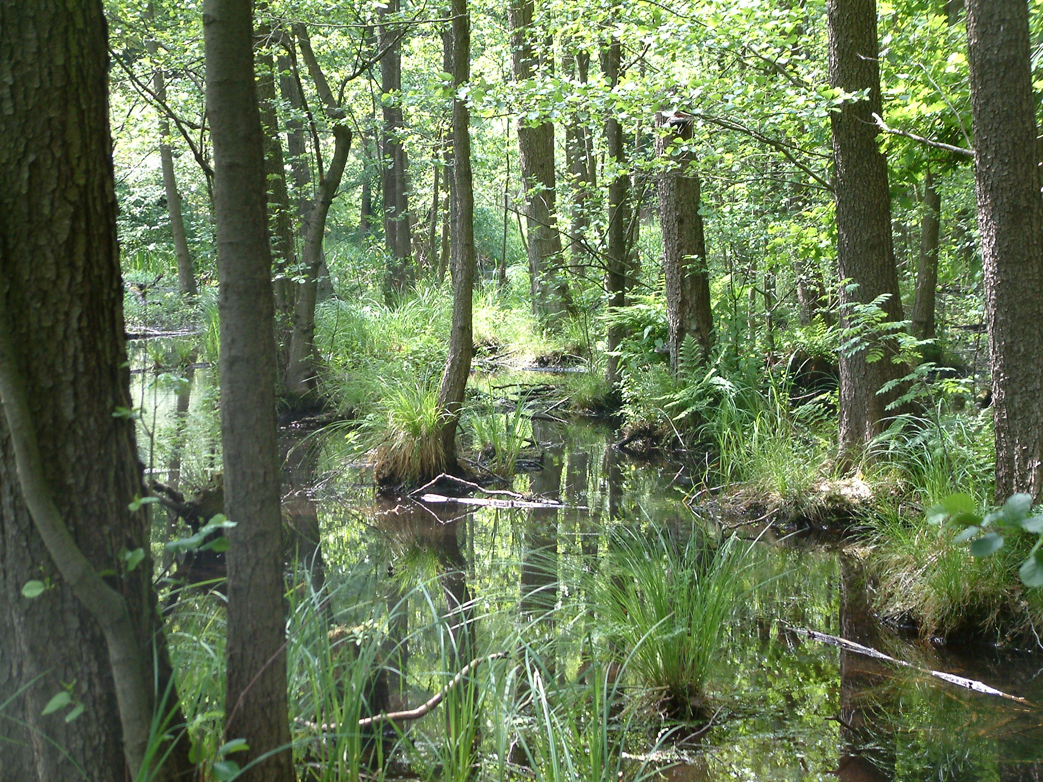 Erlenbruchwald (Alnus glutinosa). Der Fluss Briese fließt beim Ort Birkenwerder (Ortsteil Briese) durch diesen Erlenbruchwald.